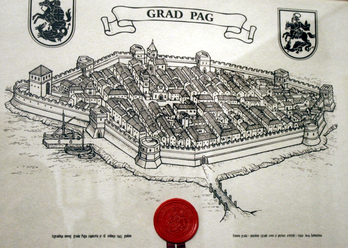 Izgradnja novog grada Paga započela je 18. svibnja 1443. godine. Obnovu grada i pojedine zgrade izveo je arhitekt i kipar Juraj Dalmatinac